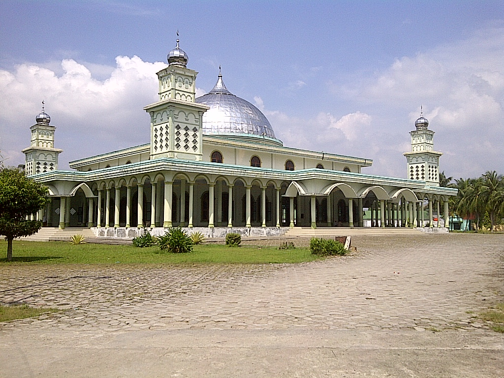 Maqsjid ini berada di kompleks Asrama Haji Rantau Prapat Kabupaten Labuhan Batu